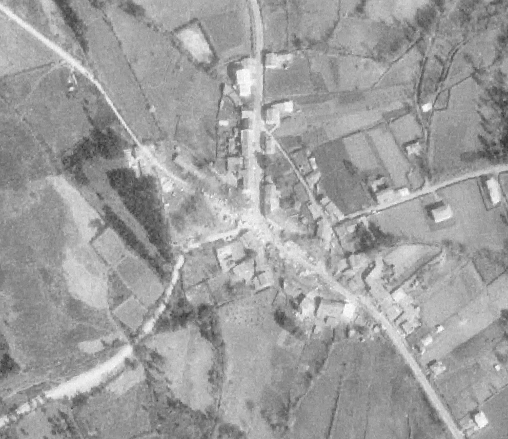 As Cruces (Sobrado, Galiza) no Vuelo Nacional de 1980-1986. Día de feira.